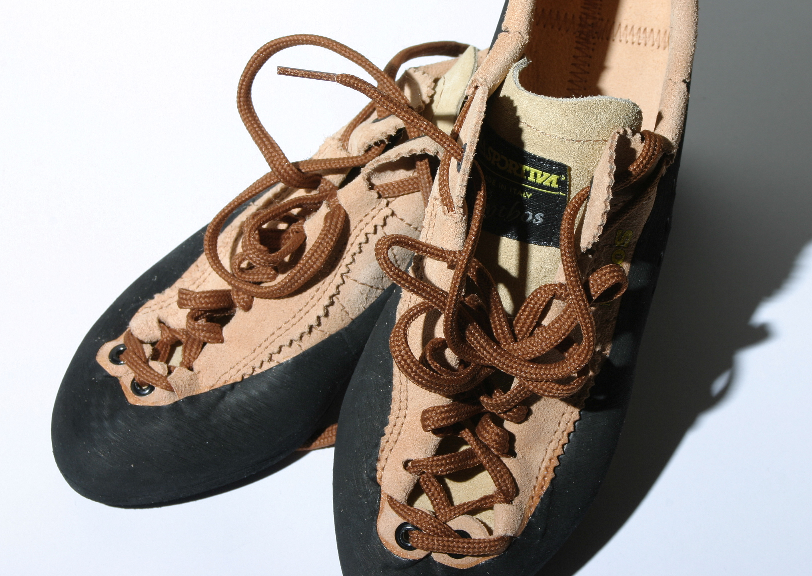 Chaussons d'escalade de la marque La Sportiva et du modèle "Mythos". Photo prise à l'intérieur.